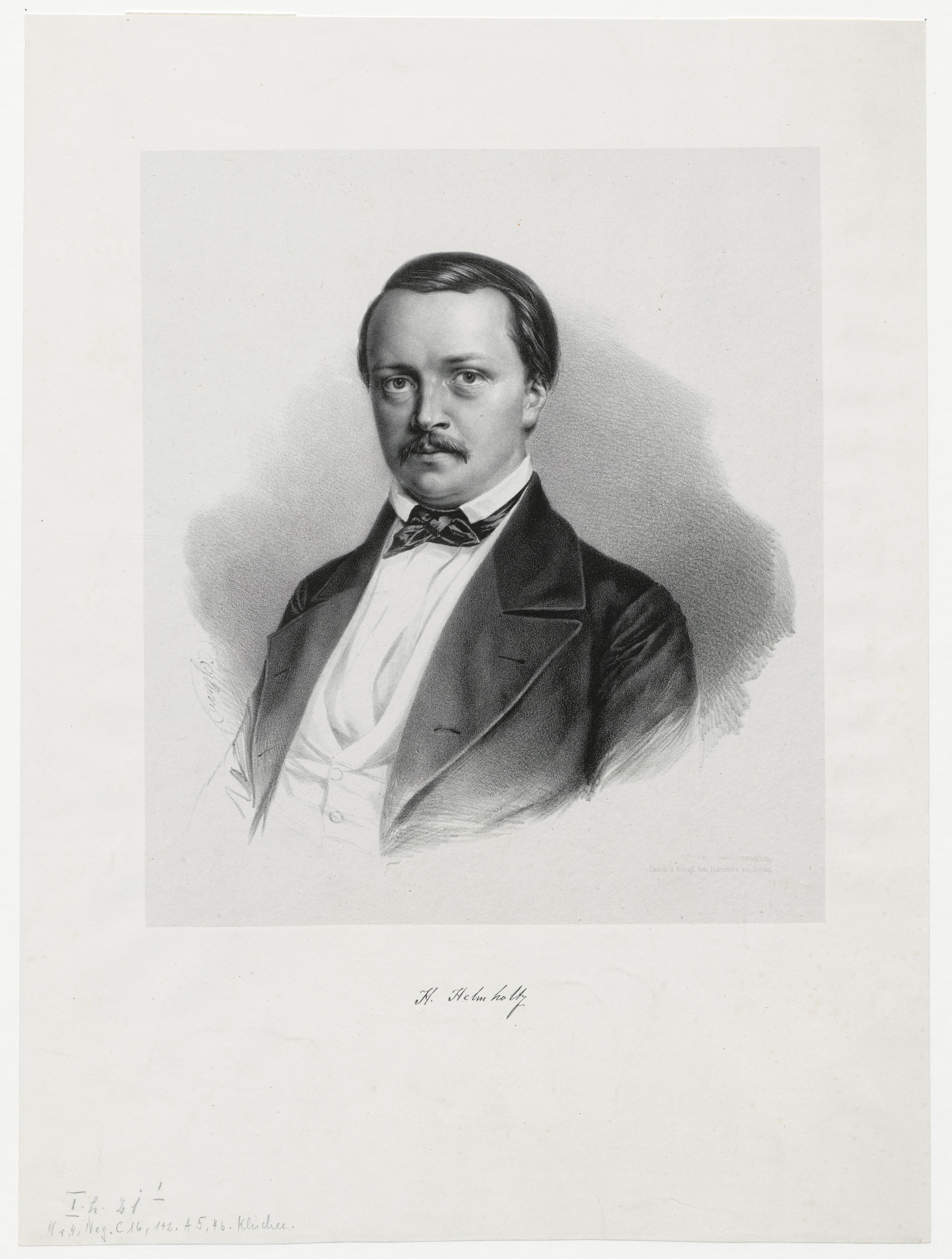 Depicted person: Hermann von Helmholtz, Physiologe, 1858–1871 Professor in Heidelberg